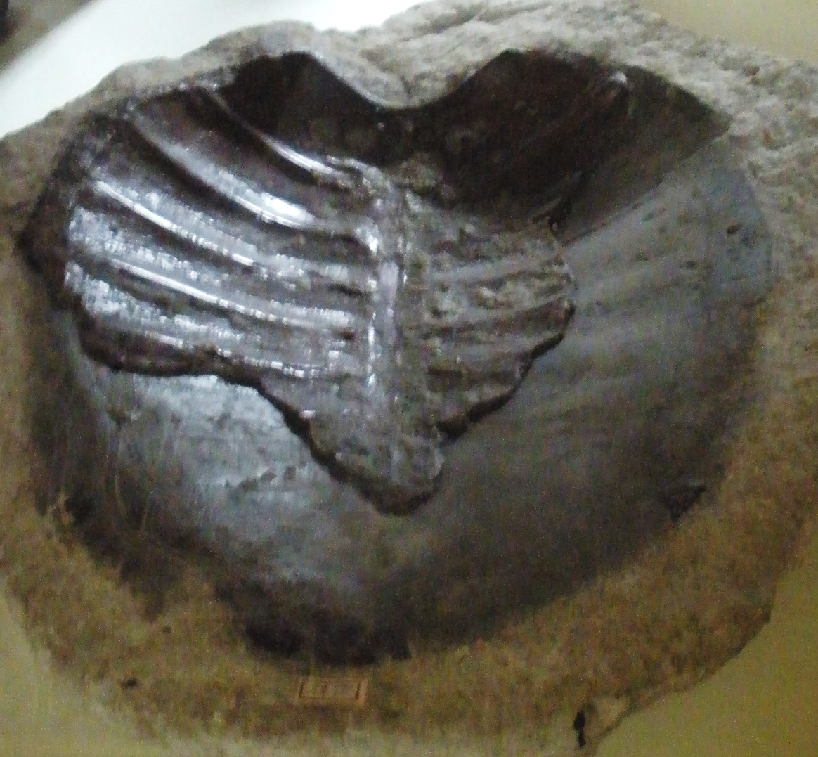 Fossil of Puppigerus, an extinct turtle- Took the photo at Teylers Museum, Haarlem